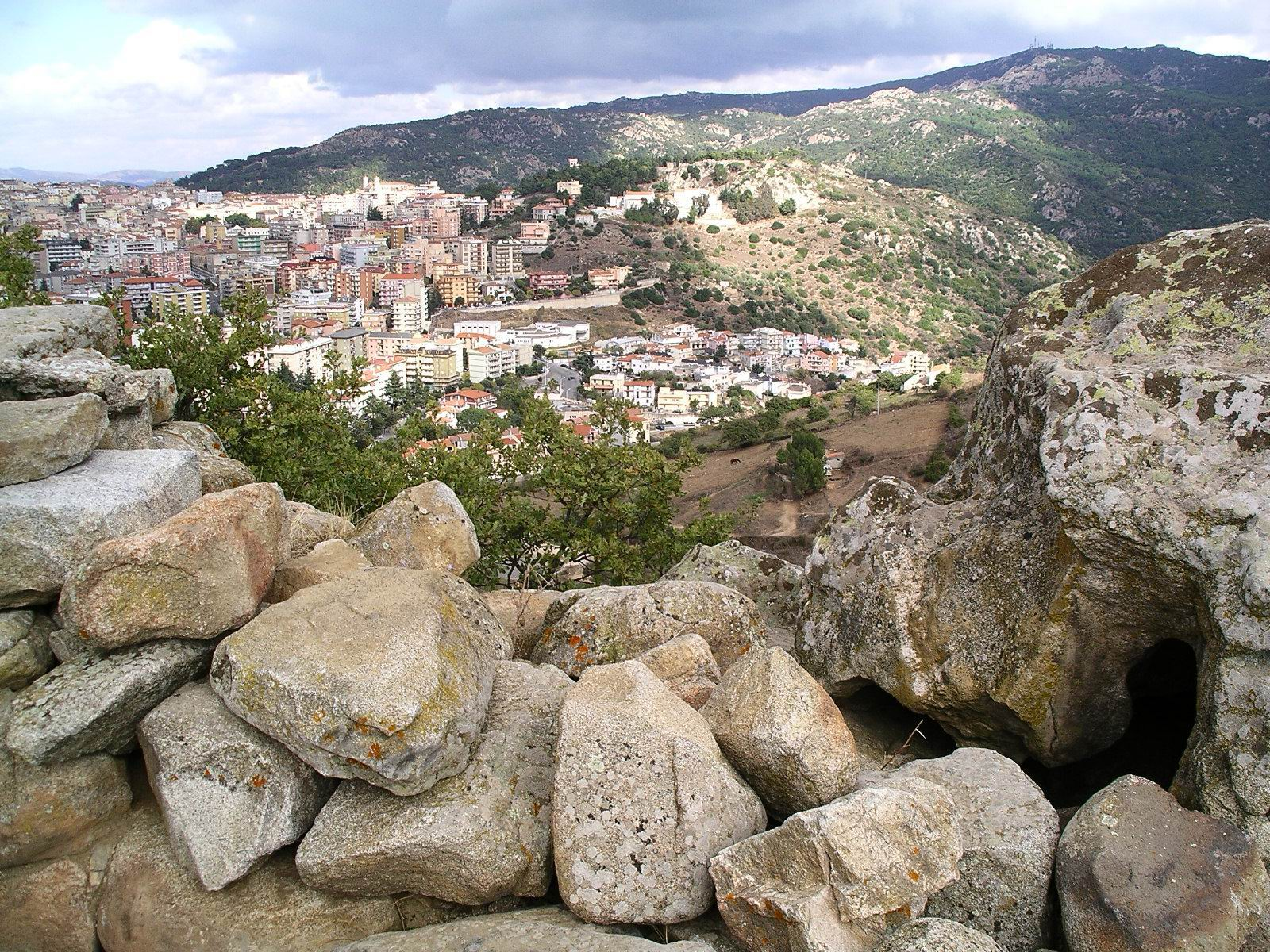 Vista sulla Città e sul Monte Ortobene dal Nuraghe Tanca manna